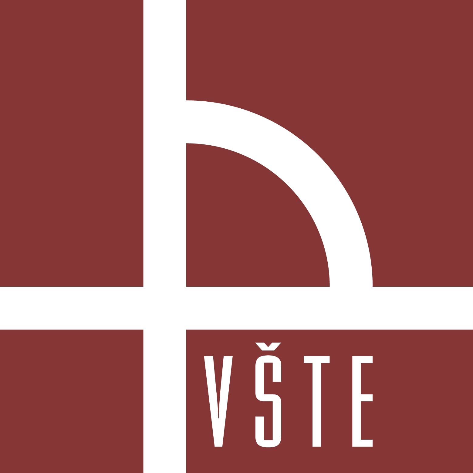 Logo VŠTE